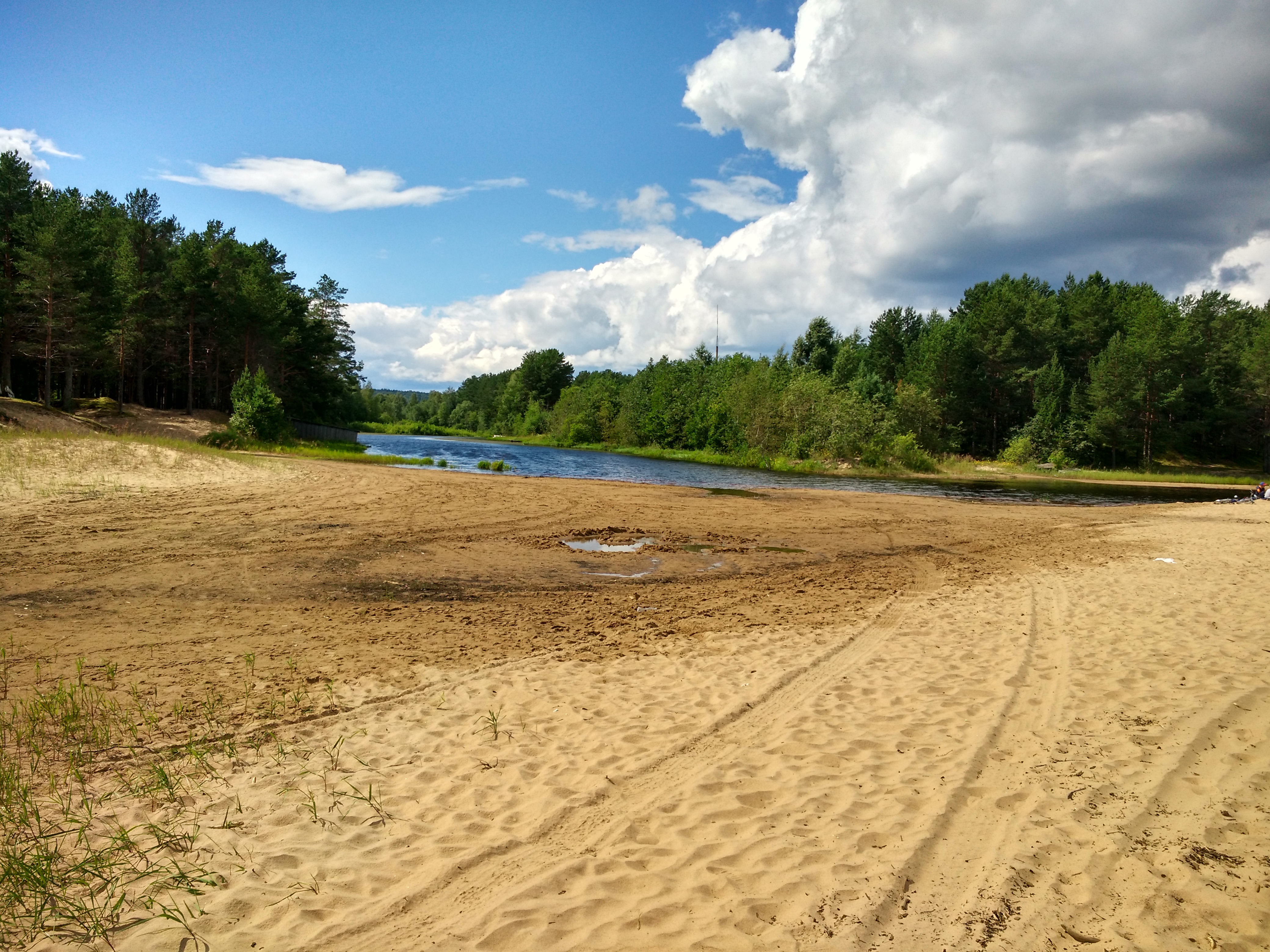 Шелтозерский берег: северная часть села, кадастровые кварталы 10:22:0020101, 10:122:0020104, на южном берегу Шелтозерской бухты Онежского озера, в приустьевой части рек Шелтозерка и Сарбахта. Шёлтозеро, Прионежский район, Карелия